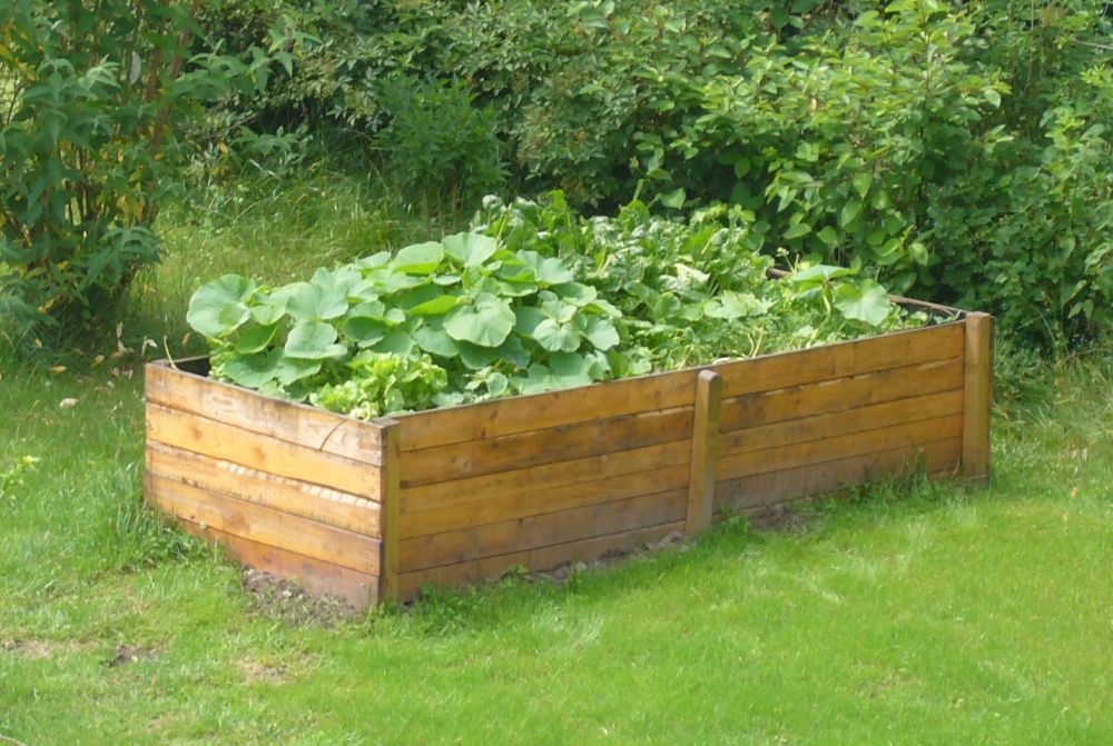 Hochbett aus Holz (bepflanzt mit Gemüse)